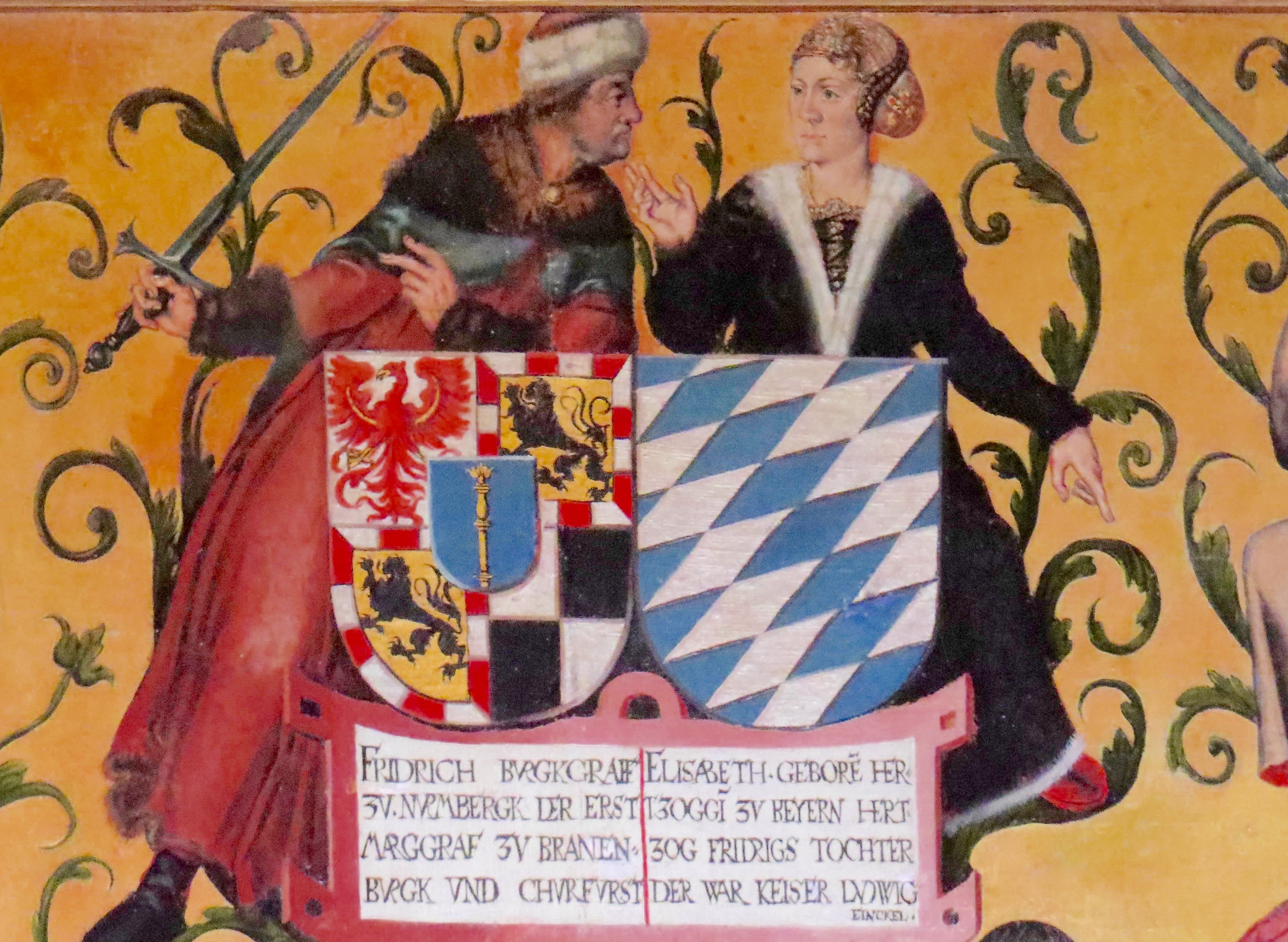 Fridrich Bvrgkraff zv Nvrmbergk der erst Marggraf zv Branenbvrgk vnd Chvrfvrst, Elisabet gebore Hertzoggi zv Beyern Hrtzog Fridrics Tochter der war Keiser Ludwig Einckel, fra Christian III og Dorotheas stamtræ i Frederiksborg Slot